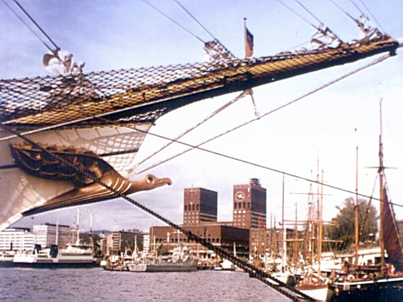 Hafen und Rathaus Oslo, im Vordergrund das deutsche Segelschulschiff Gorch Fock (2) Fotograf: presse03, selbst fotografiert, Sommer 1975 Lizenz: GNU-FDL